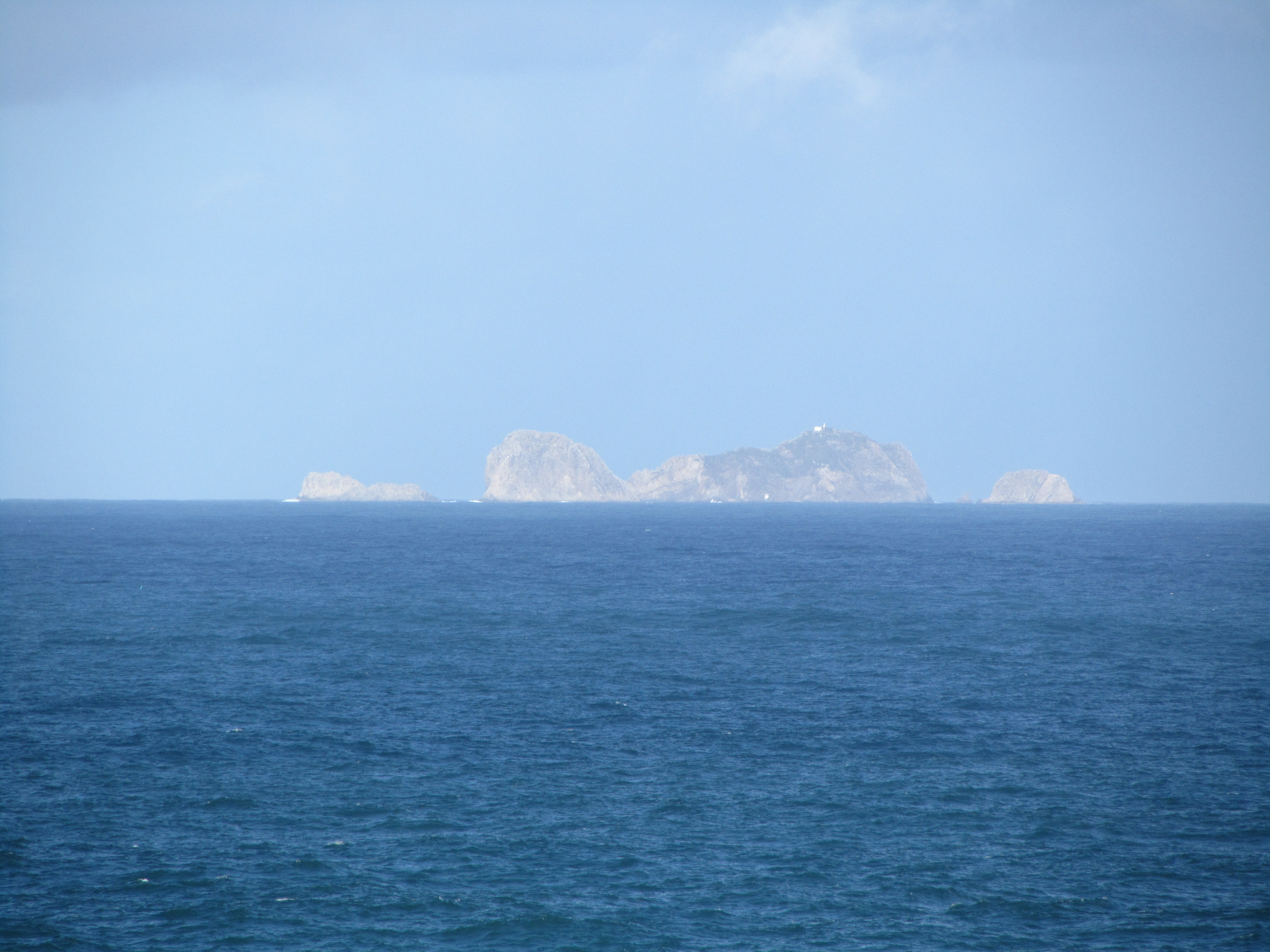 Arquipélago das Berlengas visto do cabo Carvoeiro, Peniche, distrito de Leiria, Portugal: no alto da Berlenga Grande, o Farol Duque de Bragança.